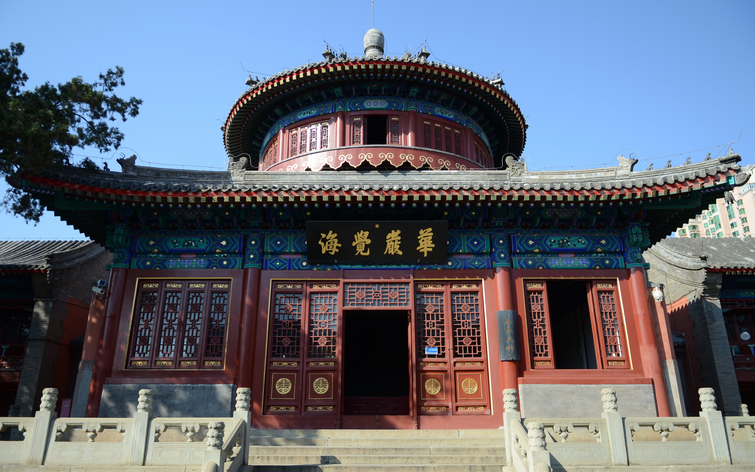 中文（中国大陆）: 悬挂永乐大钟的钟楼